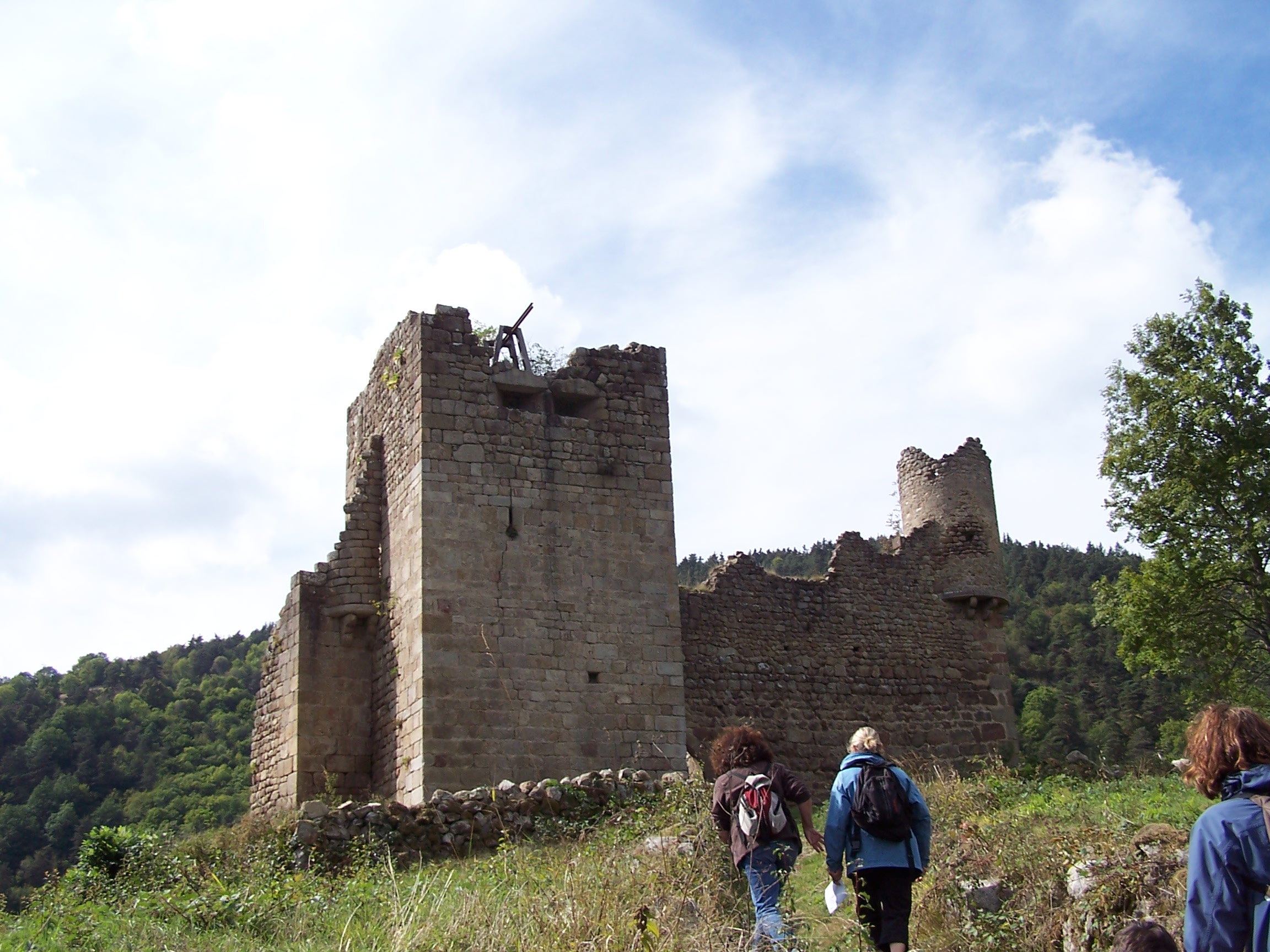 Arrivé sur le site du château de Carry, à Grazac en Haute-Loire (43).